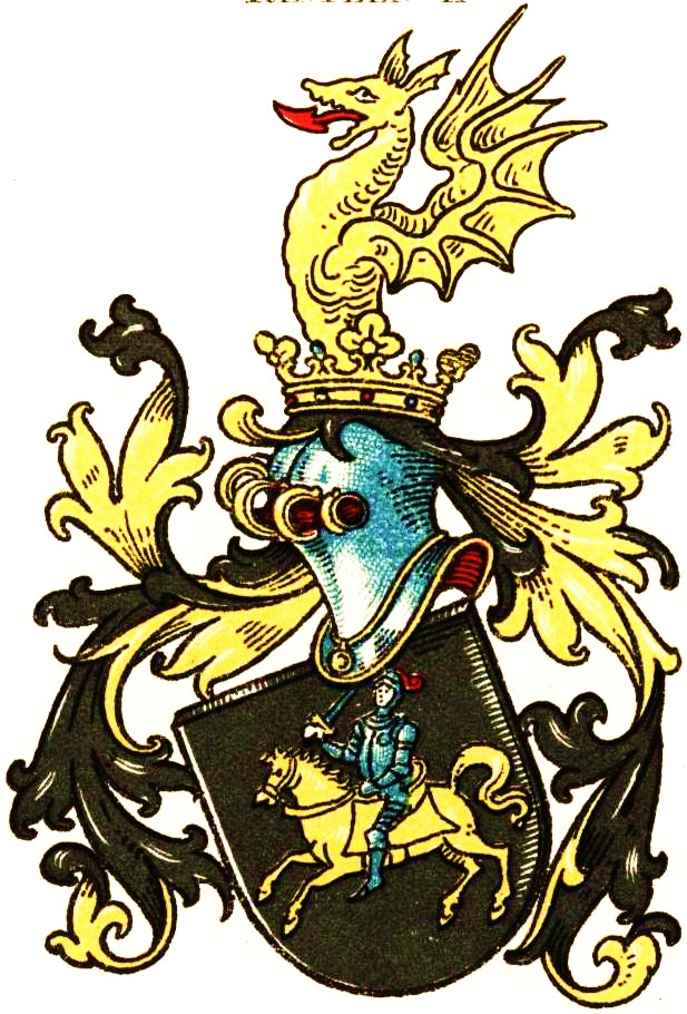 Wappen der Freiherren von Ripperda